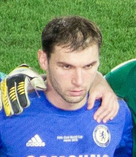 Branislav Ivanović (décembre 2012)